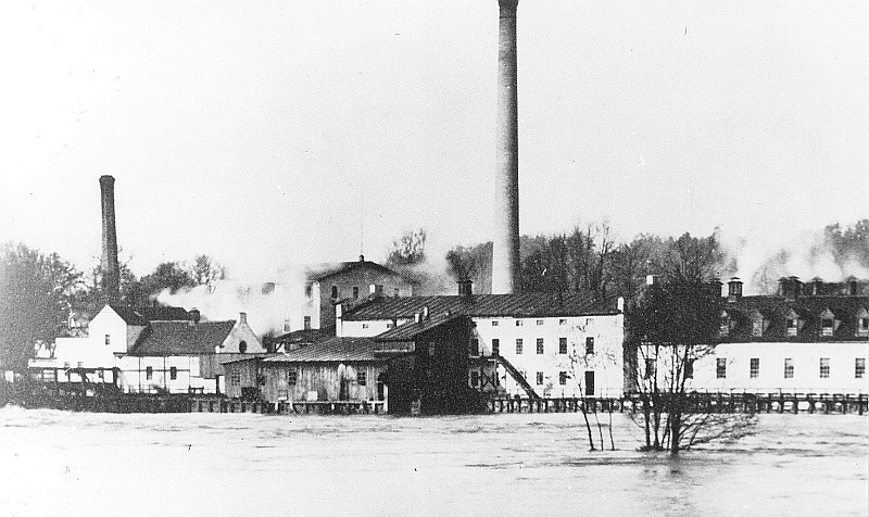 Original image description from the Deutsche Fotothek Bad Muskau. Papierfabrik, um 1900, aus: Graf von Arnim/Boelke 1979